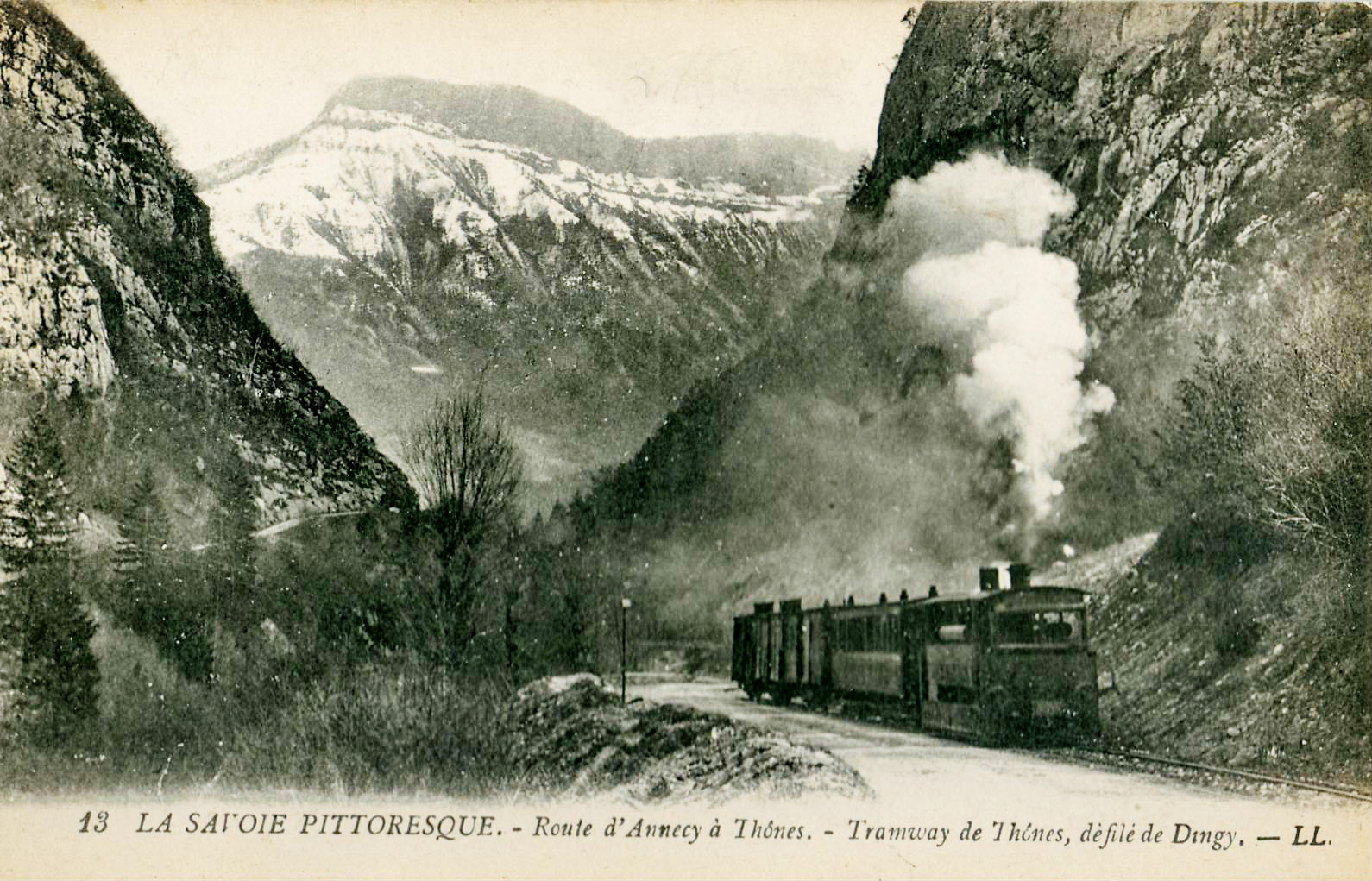 Carte postale ancienne éditée par LL, n°13 :La Savoie pittoresque : Route d'Annecy à Thônes - Tramway de Thônes - défilé de Dingy